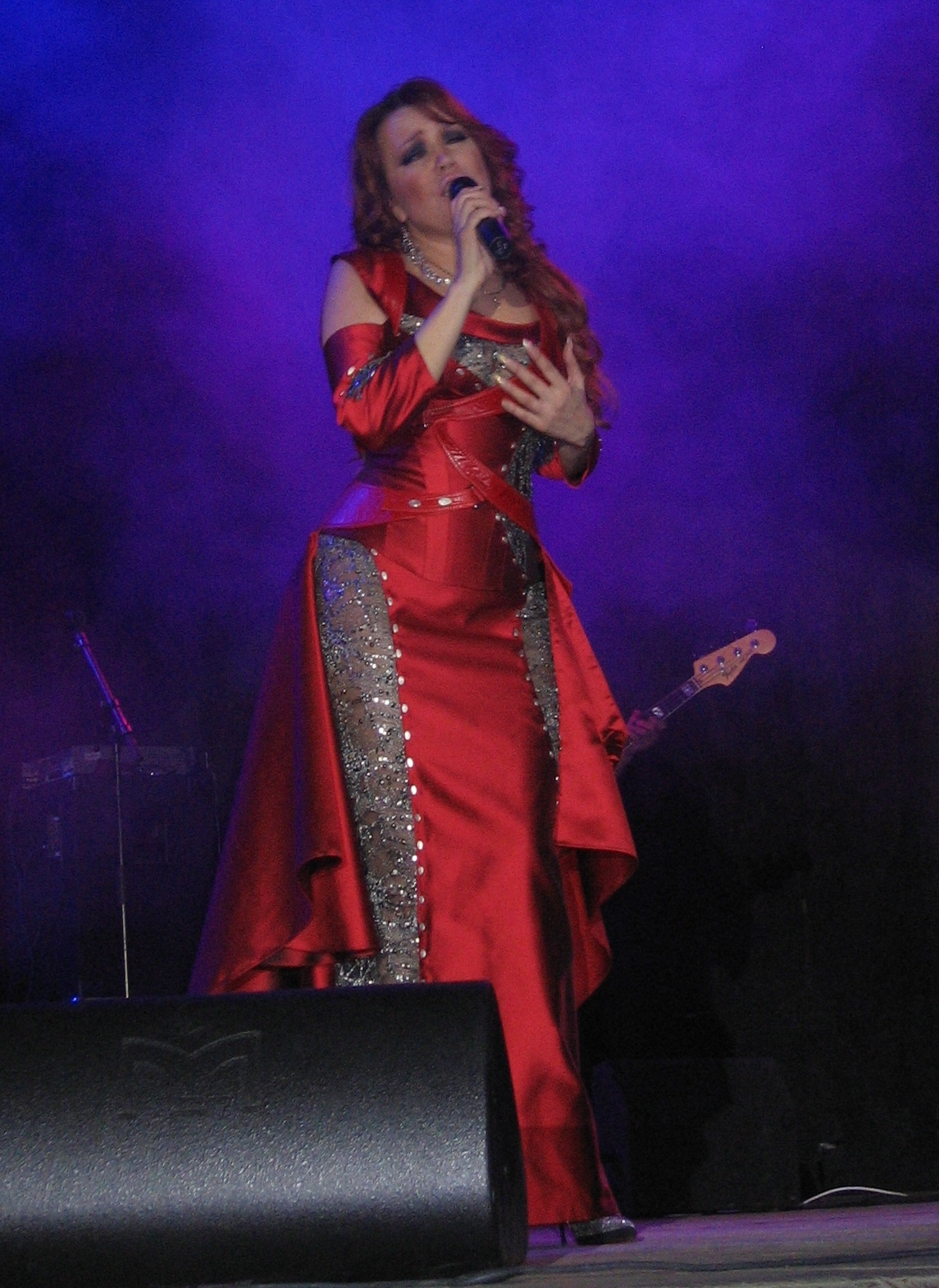 Певица Азиза.